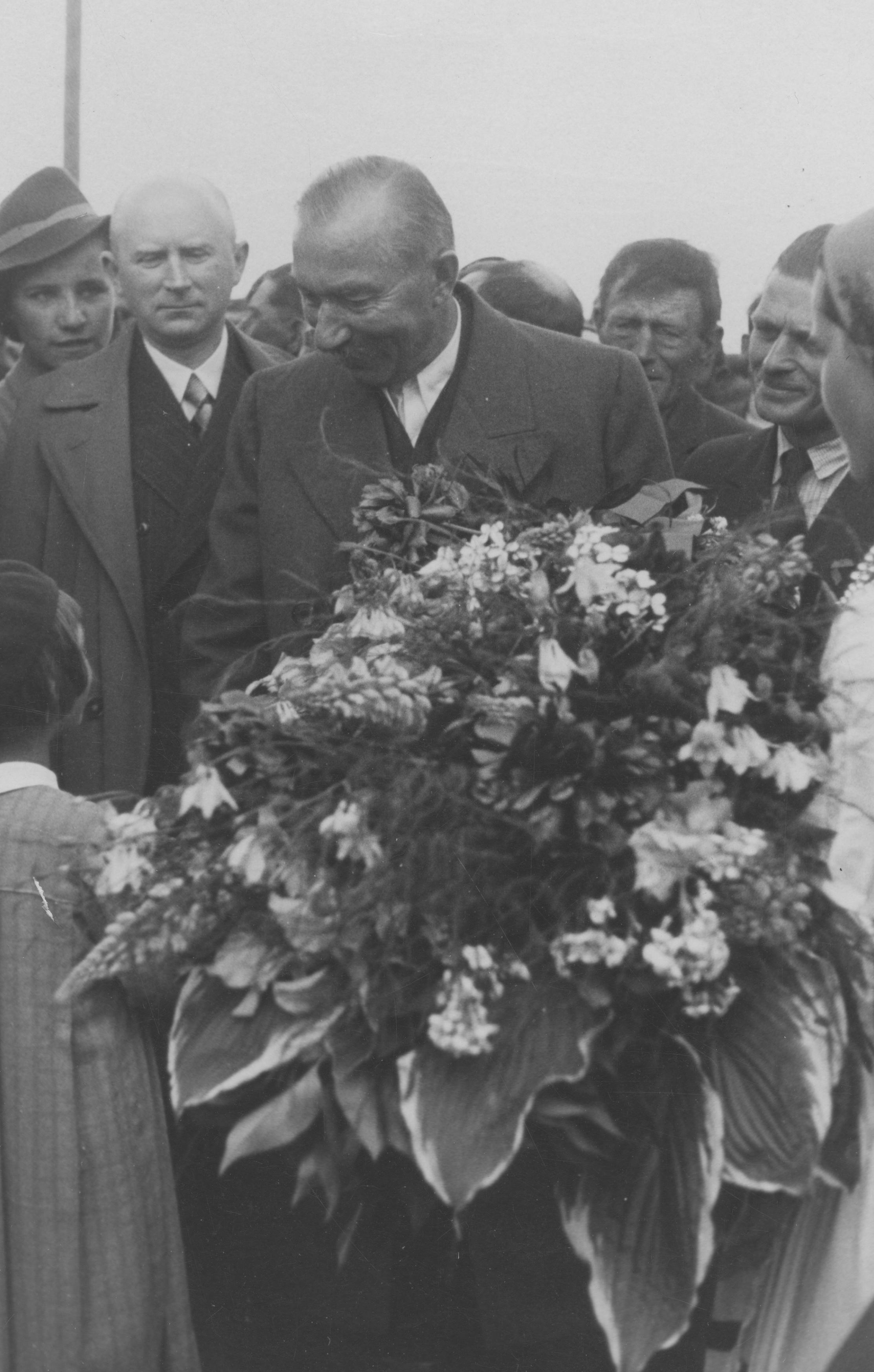 Wizyta Wincentego Witosa we wsi Munina. Jedna z mieszkanek wsi wręcza kwiaty Witosowi.